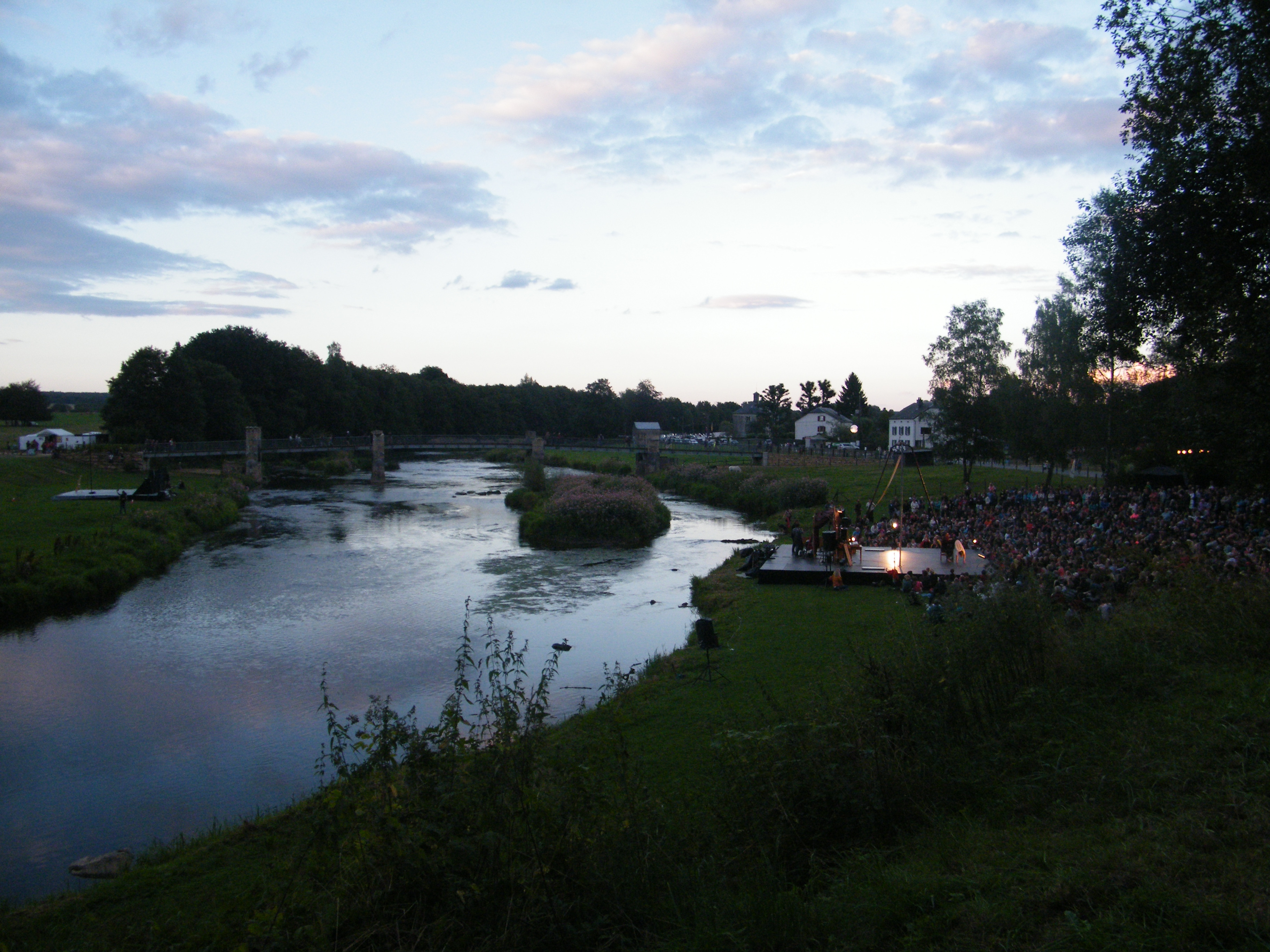 Festival de Chassepierre - 20 août 2016 Vue sur le terrain situé entre la Semois et la rue du Breux, proche de la passerelle.